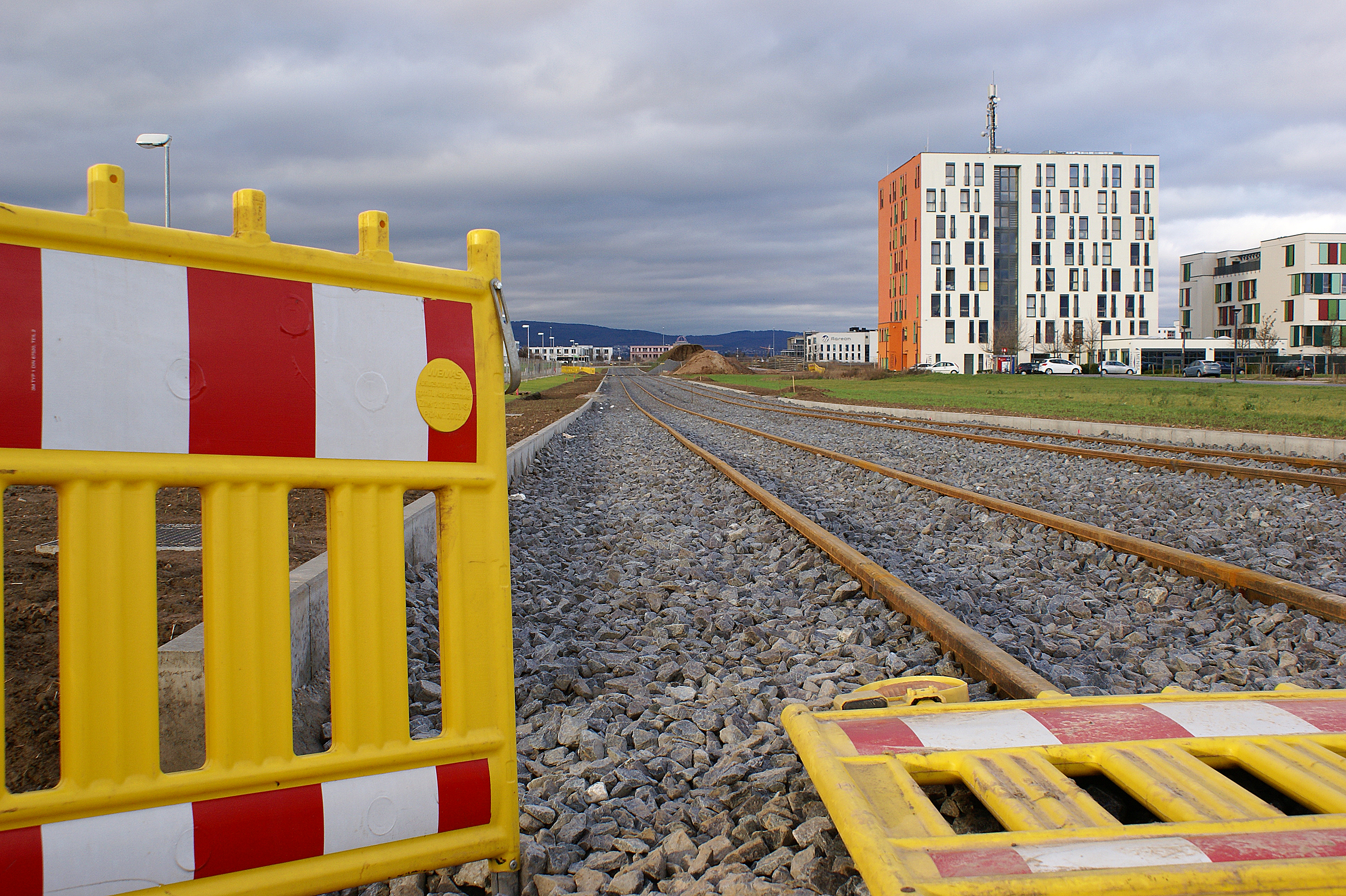 Baustelle zwischen Stadion und Plaza